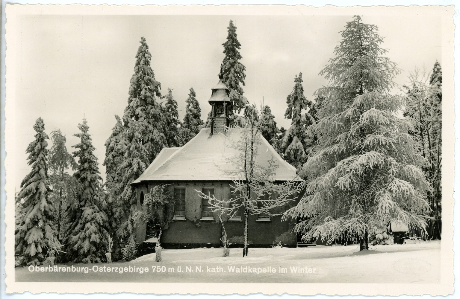 Oberbärenburg; Katholische Waldkapelle im Winter This postcard is from publisher Brück & Sohn in Meißen ( postcard has a unique number 26721 and is available in a higher resolution at the publisher. This images was uploaded in a cooperation project between Wikipedians and the publisher.